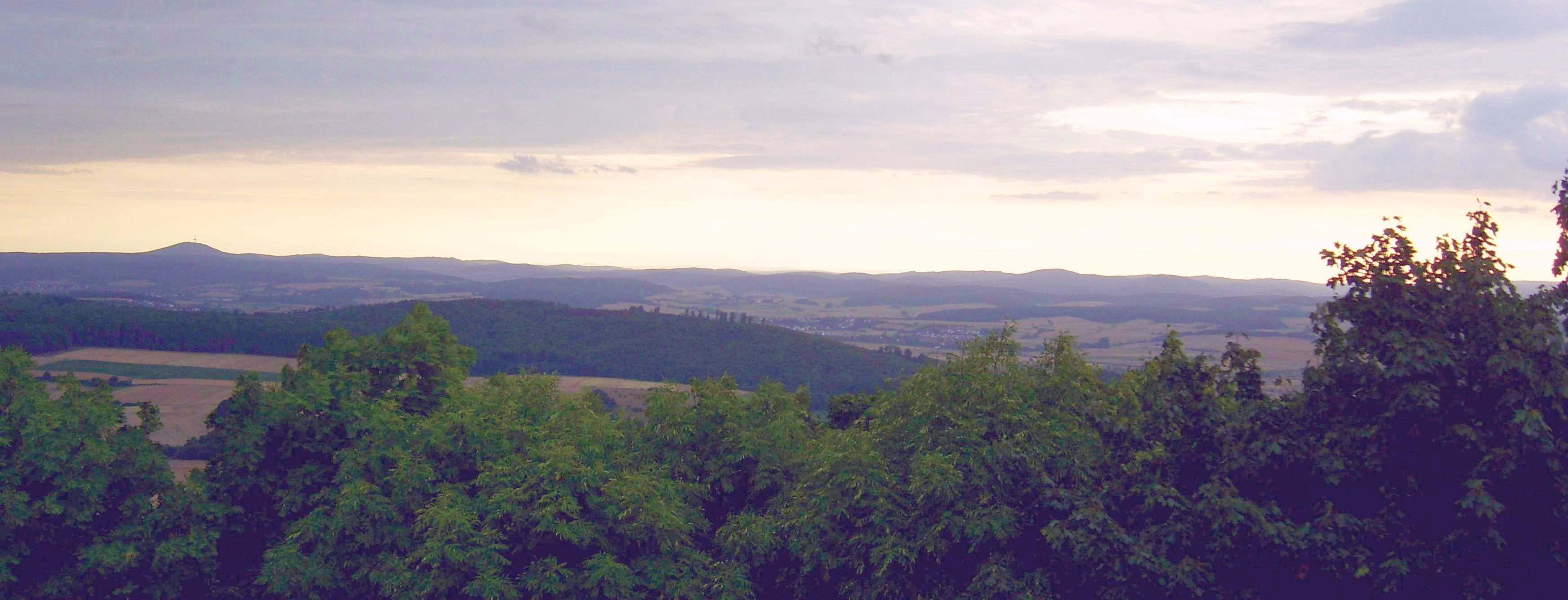 Blick vom 370m hohen Frauenberg auf den Lahnbergen ins Gladenbacher Bergland. Links der 498m hohe Dünsberg, halbrechts der 470m hohe Hemmerich; dazwischen schimmert der Westerwald durch. Zwischen dem Frauenberg und dem Hügelland rechts der Lahn liegt das Lahntal zwischen Gießen (weiter südlich, links im Bild) und Marburg (im Norden, rechts).